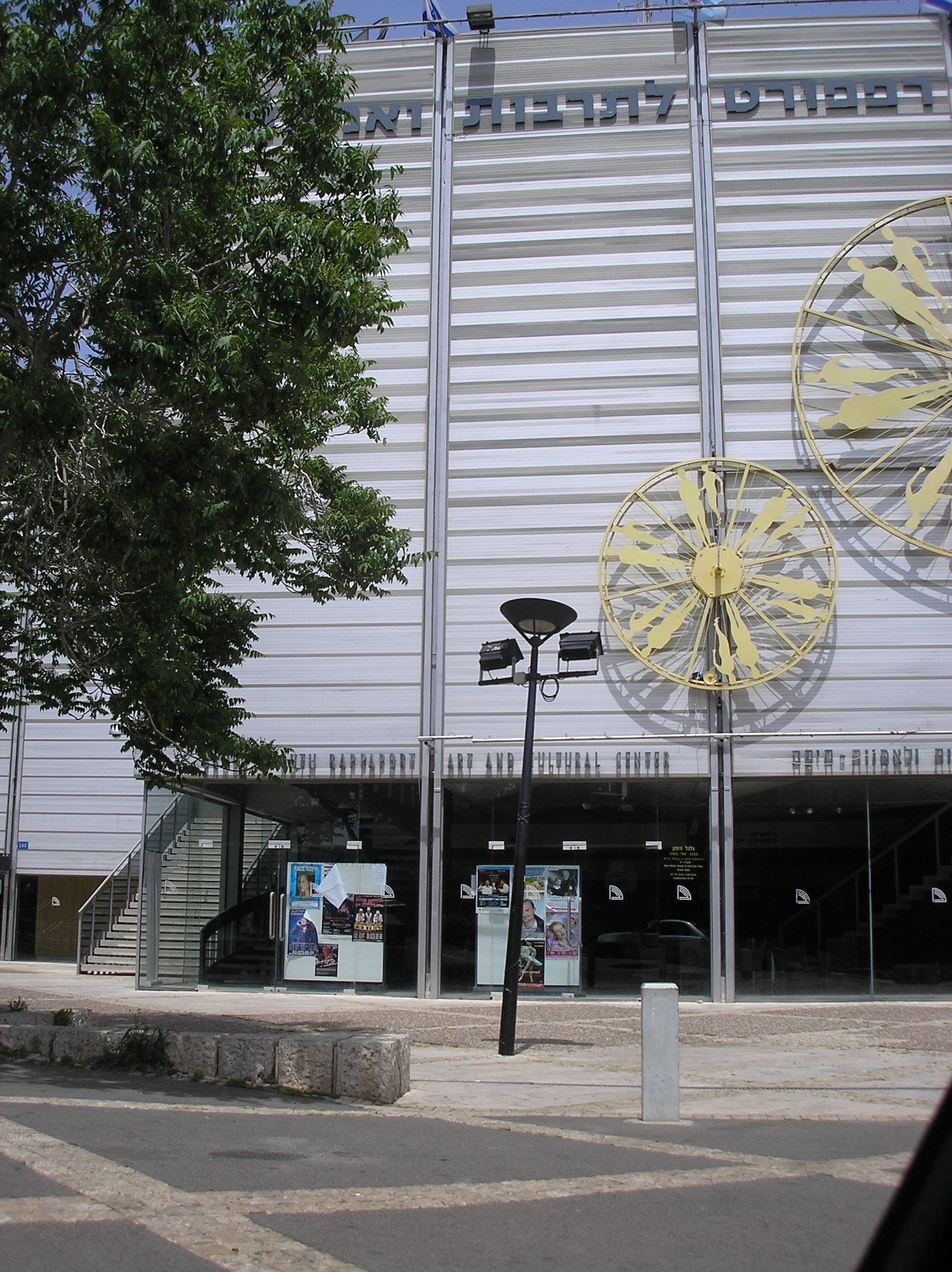 Carmel Center